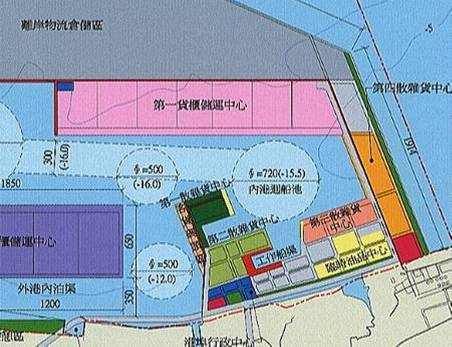 台北港港區平面圖